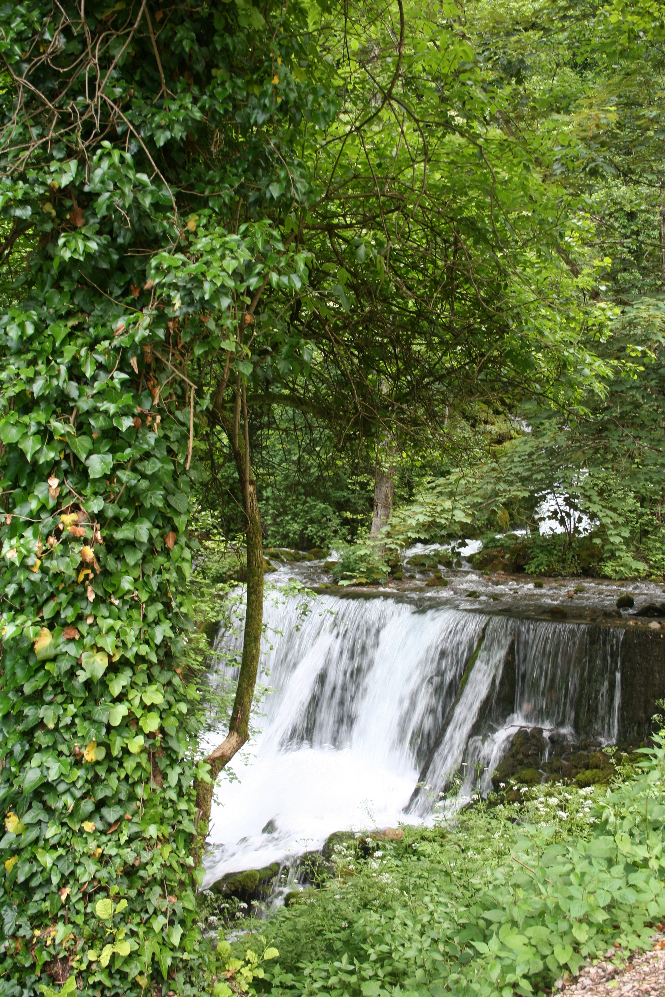 Reka Vrelo (Reka Godina), Perućac Ово је фотографија заштићеног природног добра у Србији под шифром: НП03This is a a photo of a natural area in Serbia with ID: НП03